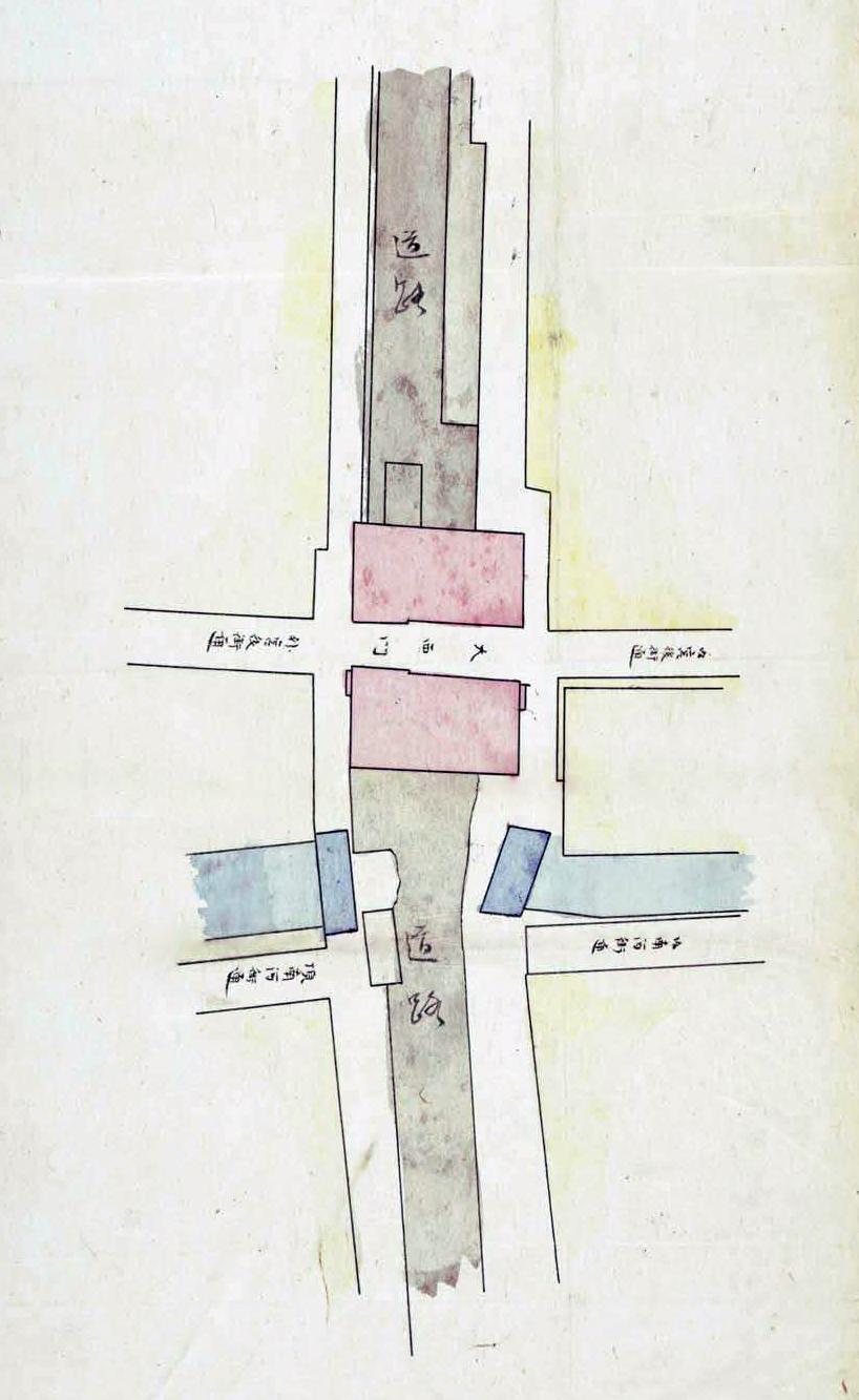 圖中可見大西門的前後分別為內宮後街跟外宮後街，南側則是五條港的南河港道、外南河街、頂南河街